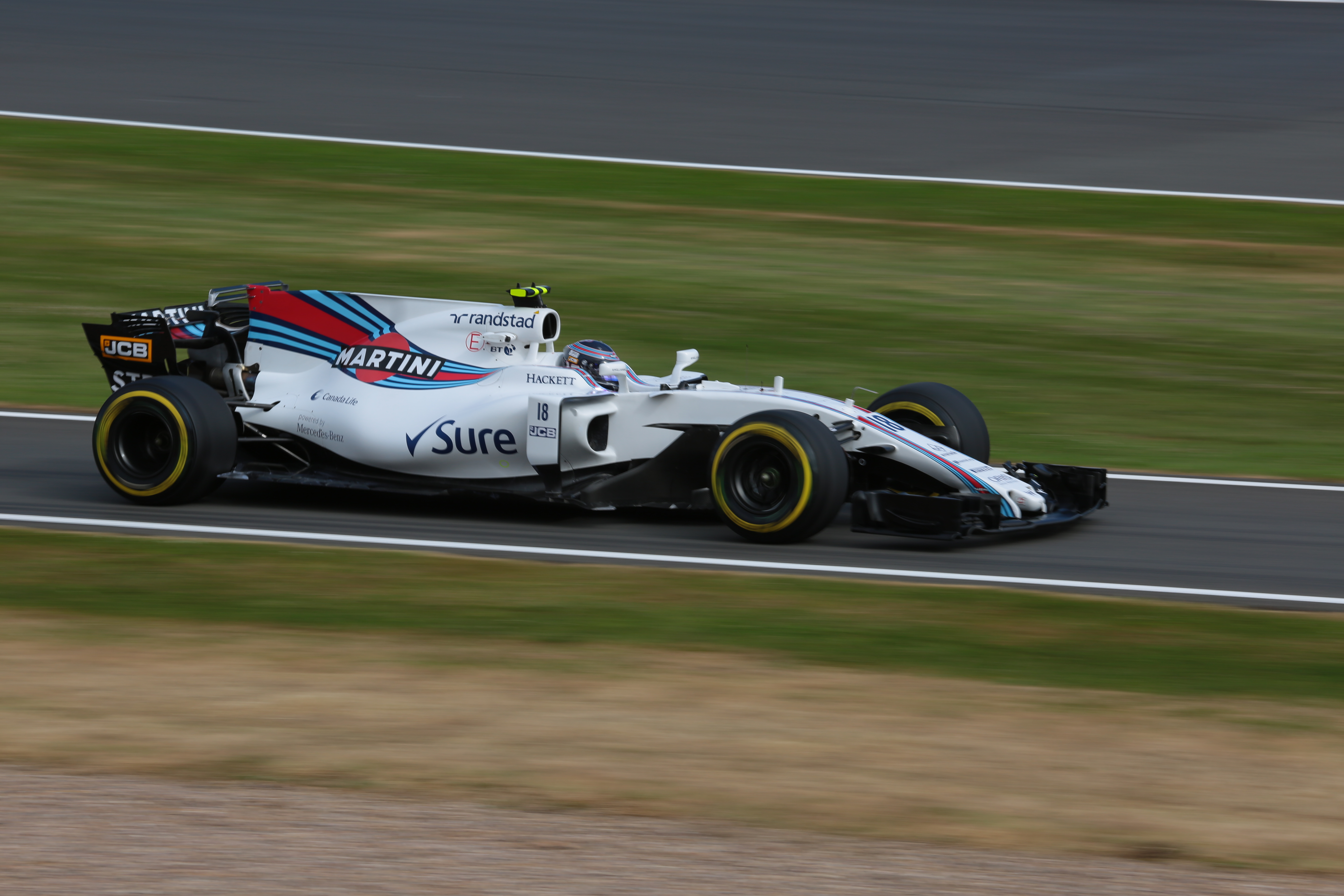 f1